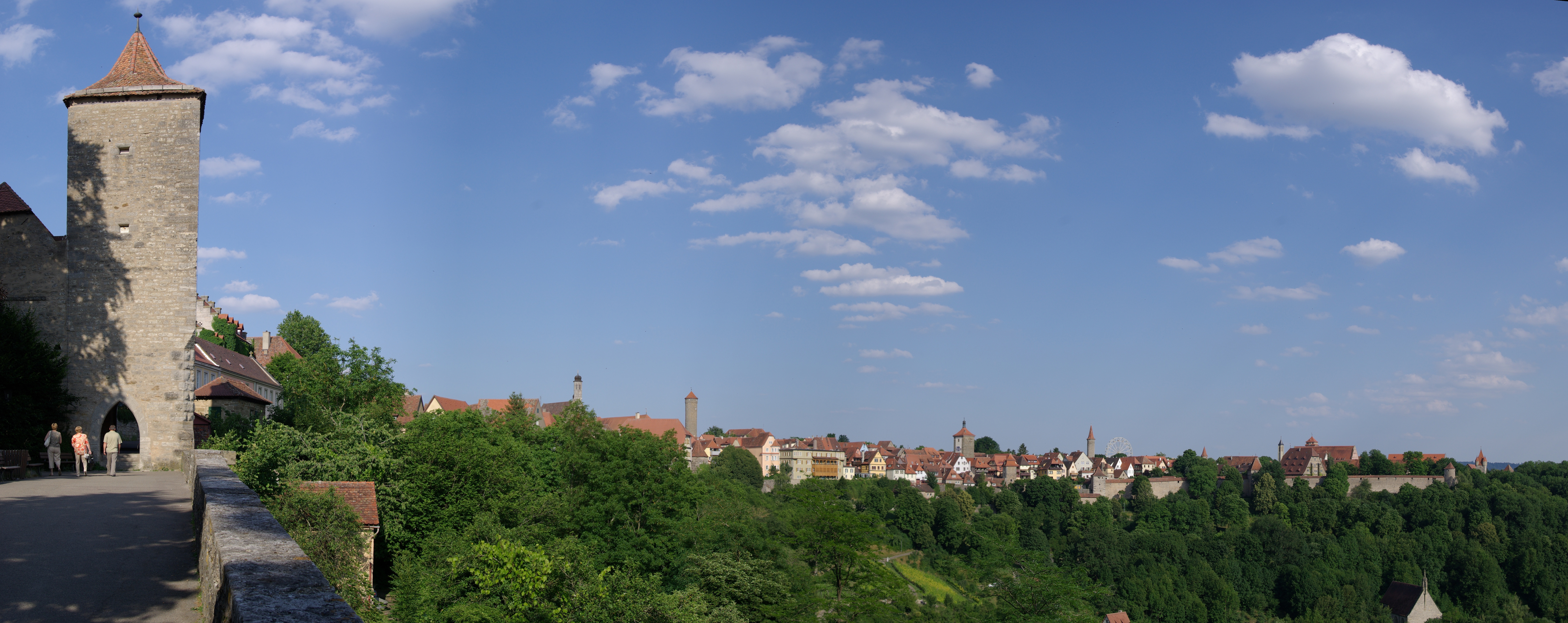 Panorama Rothenburg ob der Tauber